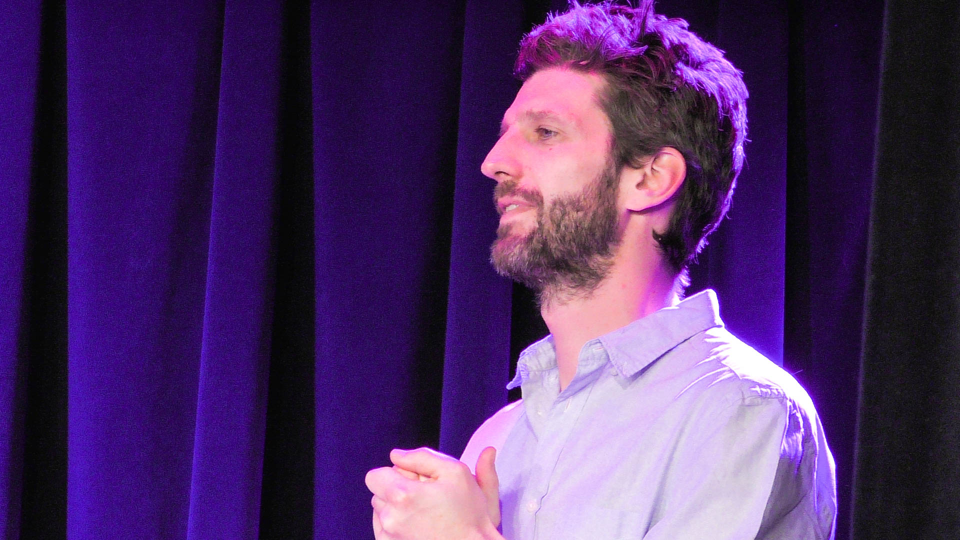 12.03.2017. Еврейский культурный центр на Никитской.